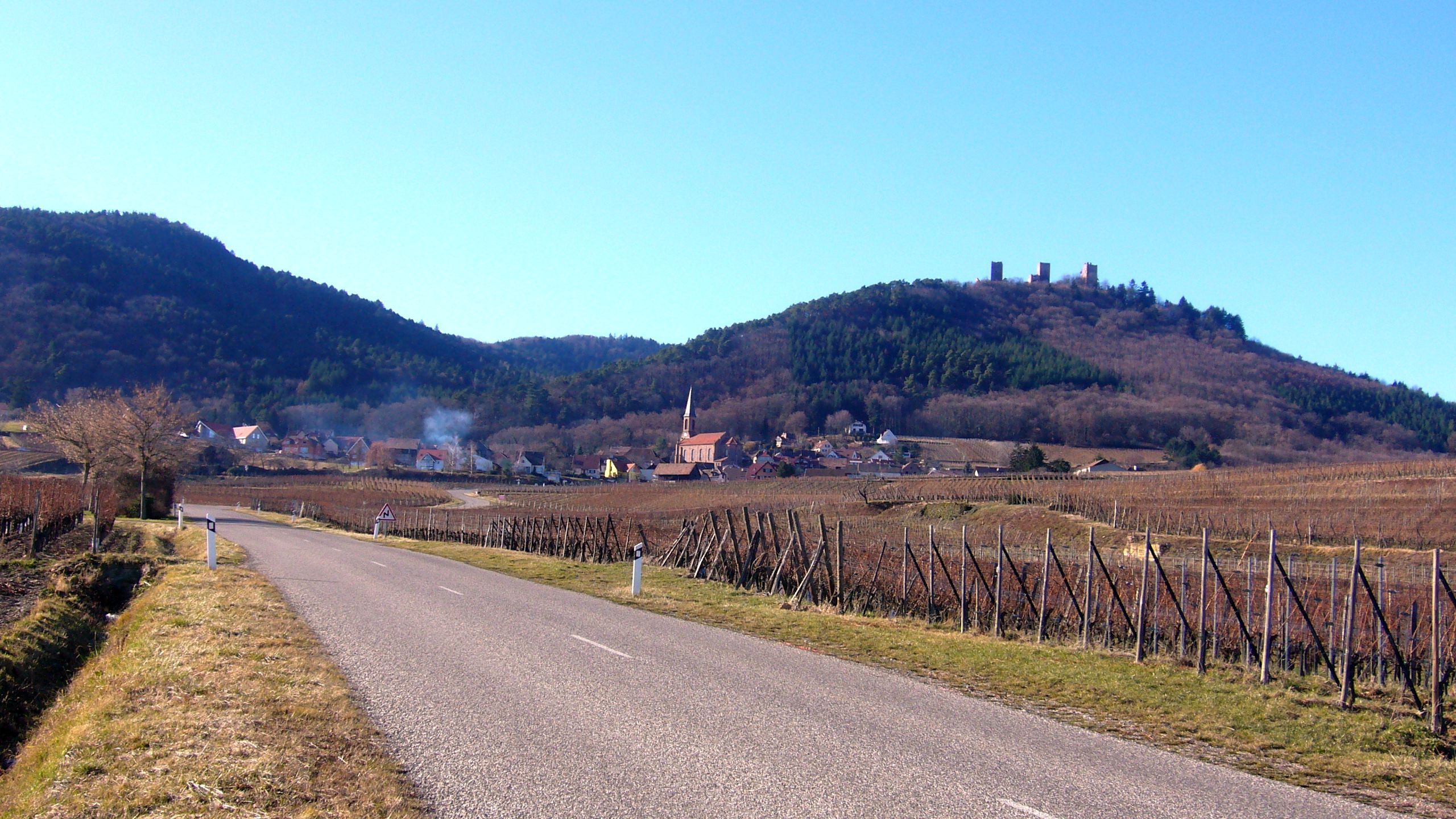 Le village de Husseren-les-Châteaux et au loin les Trois châteaux depuis la route des Vins en direction d'Eguisheim